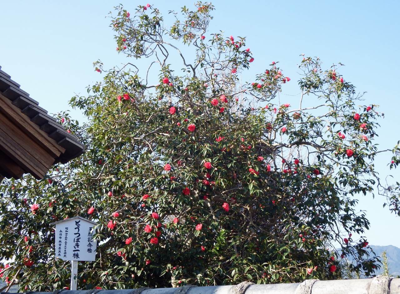 伊予国分寺の唐つばき